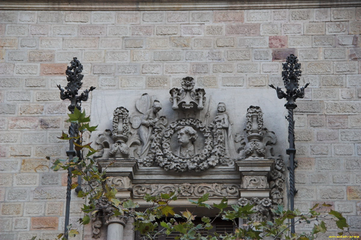 Casa Serra(Barcelona-Catalunya), obra de Josep Puig i Cadafalch 1903. Rbla.Catalunya, 112. Escultures finestres.